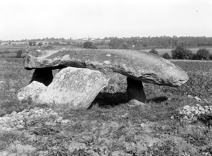 Dolmen de la Pierre-là à Saint-Plantaire. Photographie de Séraphin-Médéric Mieusement.